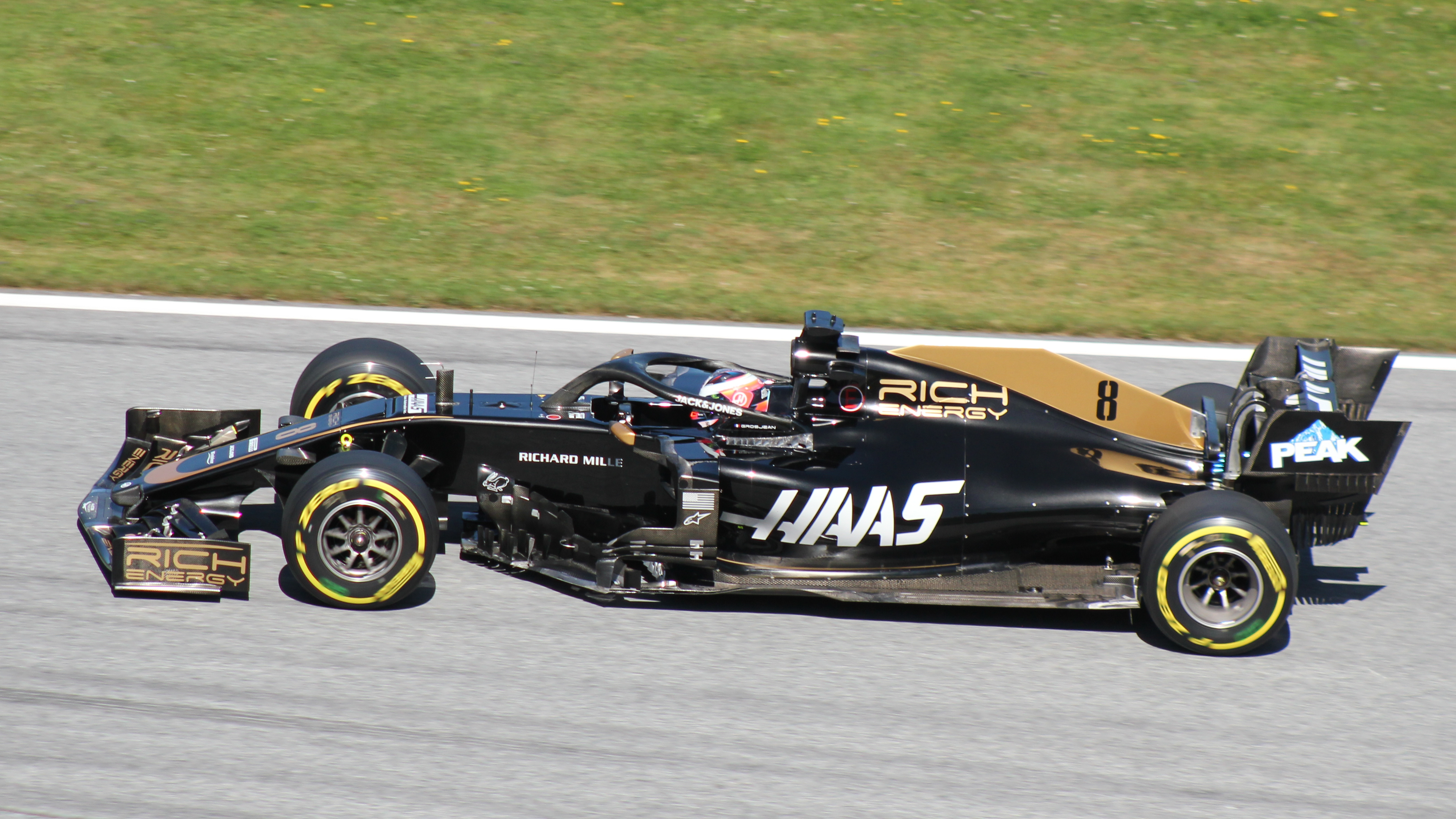 Grosjean beim Rennwochenende in Österreich 2019